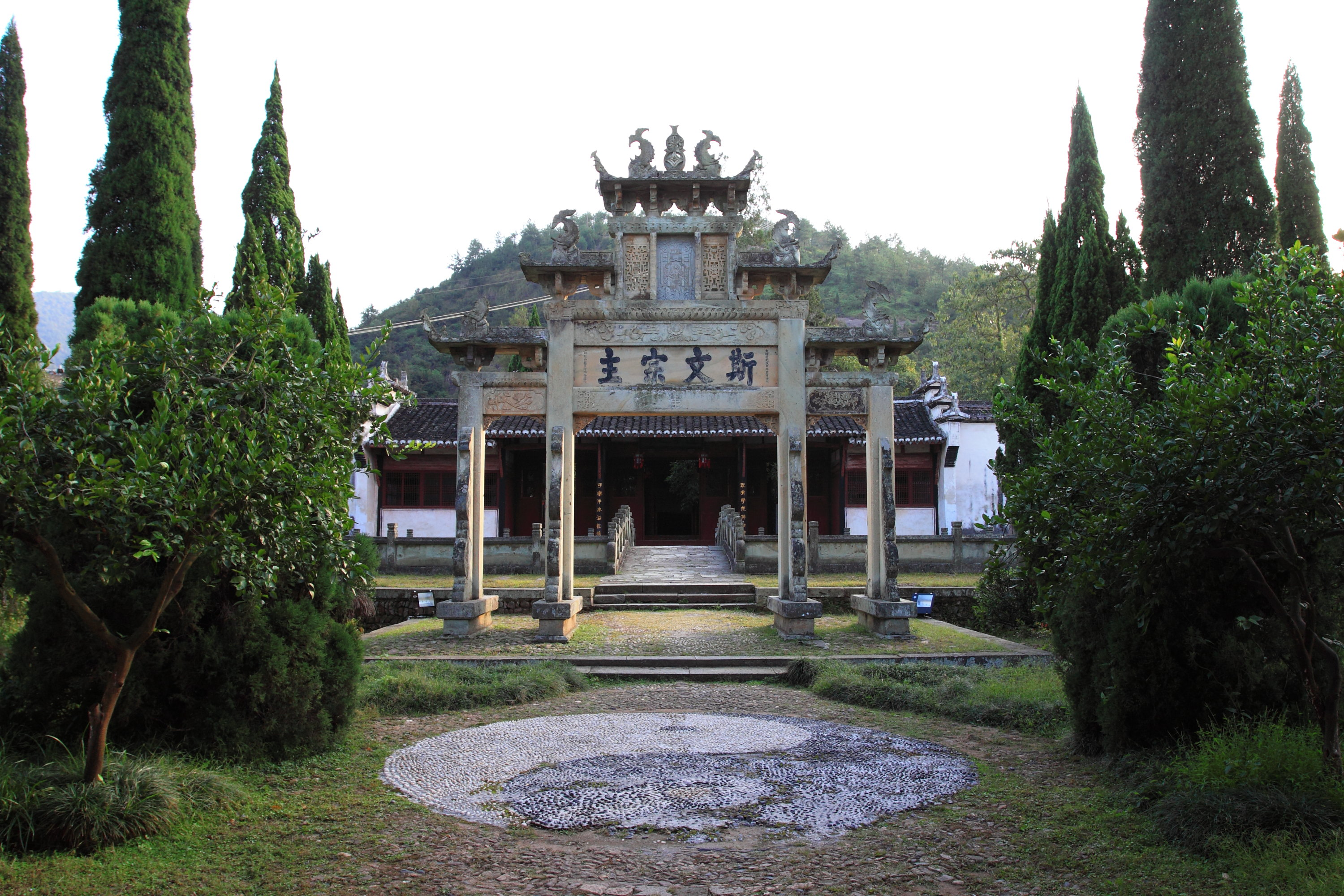 鹅湖书院石牌坊